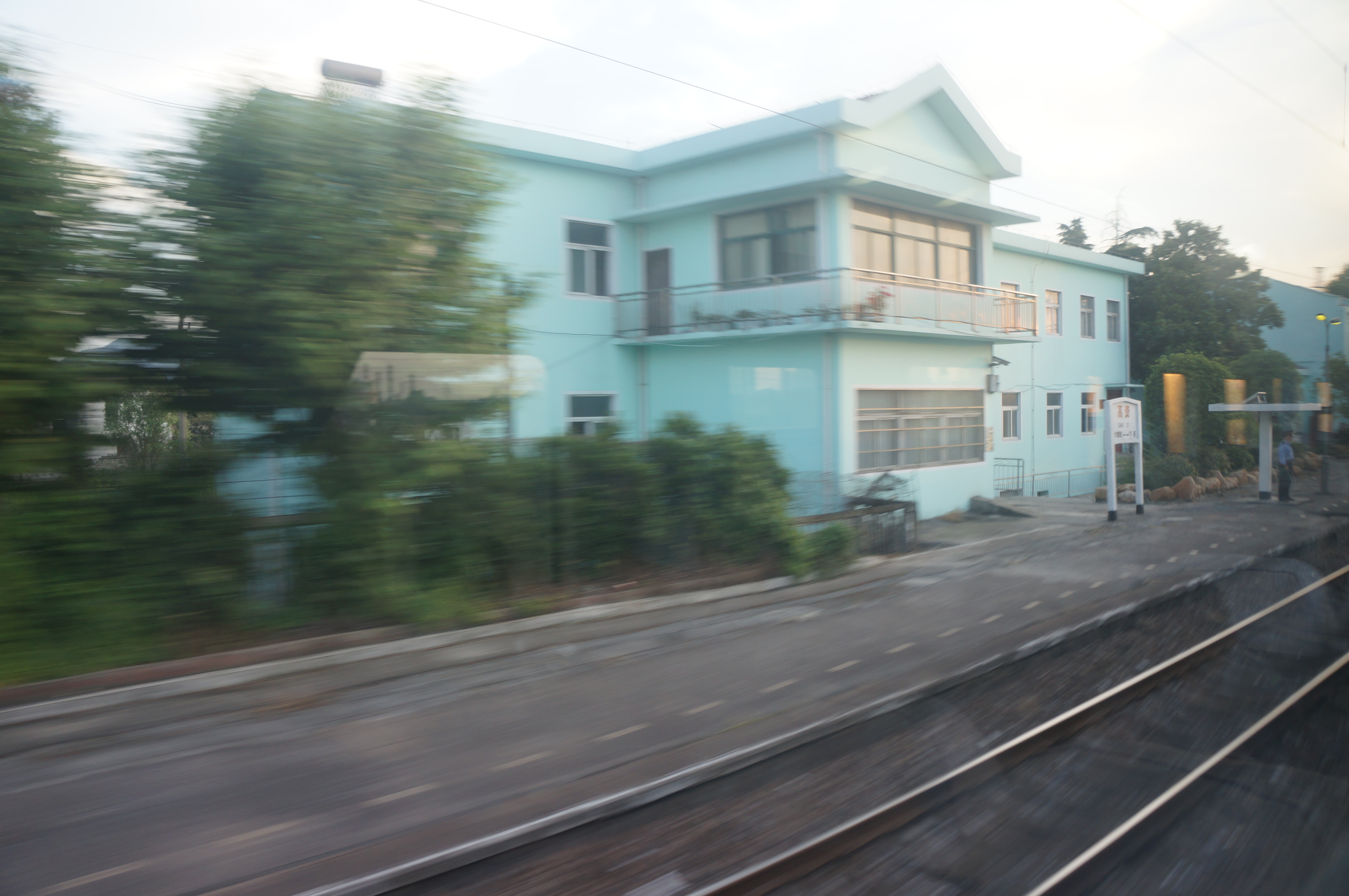 粵語: Haa6 jat1 zaam6, Haa6 Suk6